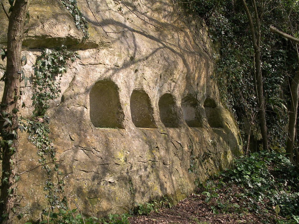 Cavités du Camp Romain de la Burette à Banville (Calvados)